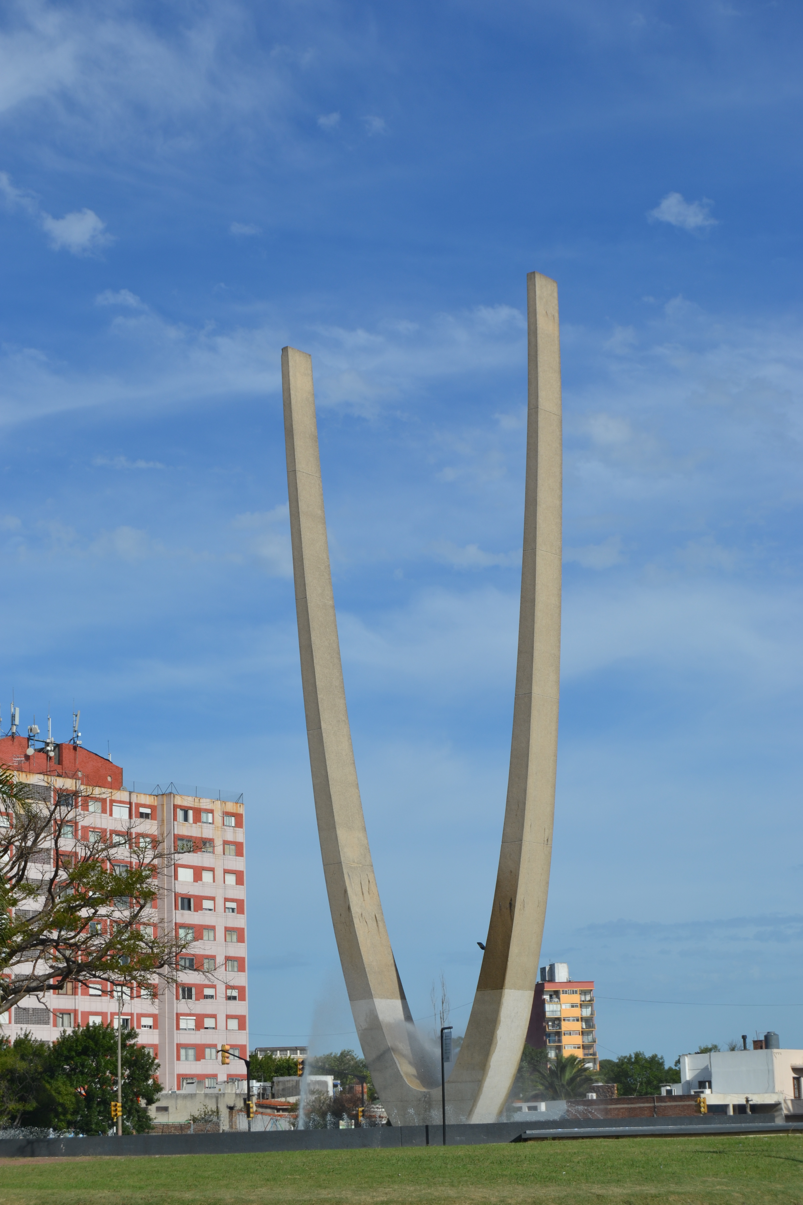 Luis Batlle Berres. Ubicada en el departamento de Montevideo